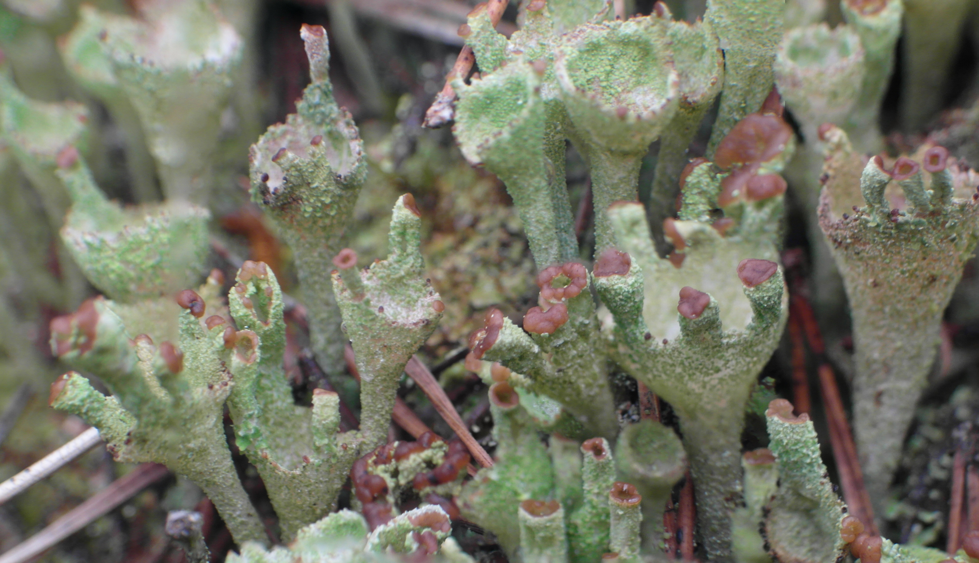 braunfrüchtige Becherflechte (Cladonia pyxidata), auch Echte Becherflechte